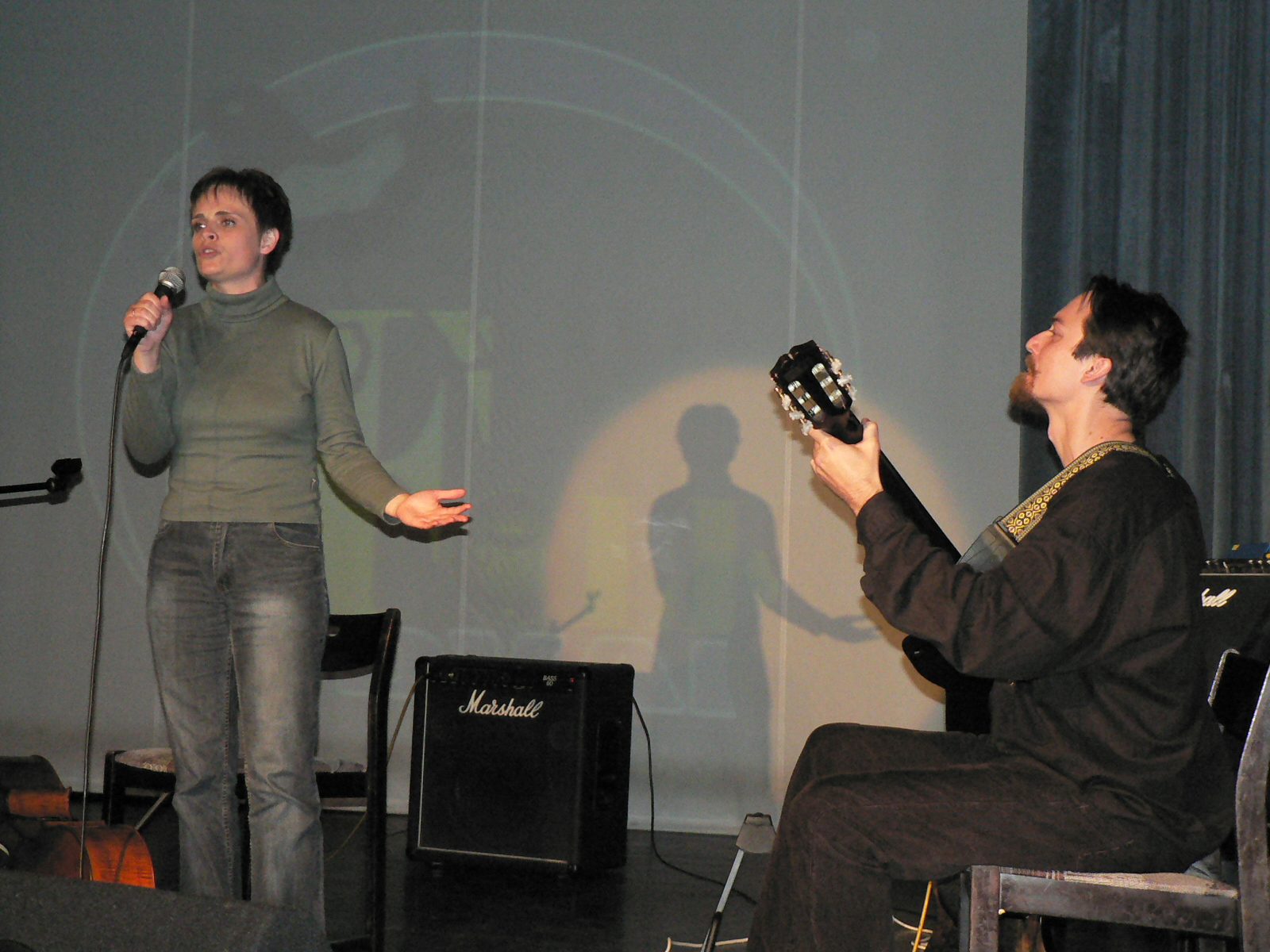 Ketten a Neofolk együttesből - a Bonyár Judit-Hűvösvölgyi Péter szerzőpáros